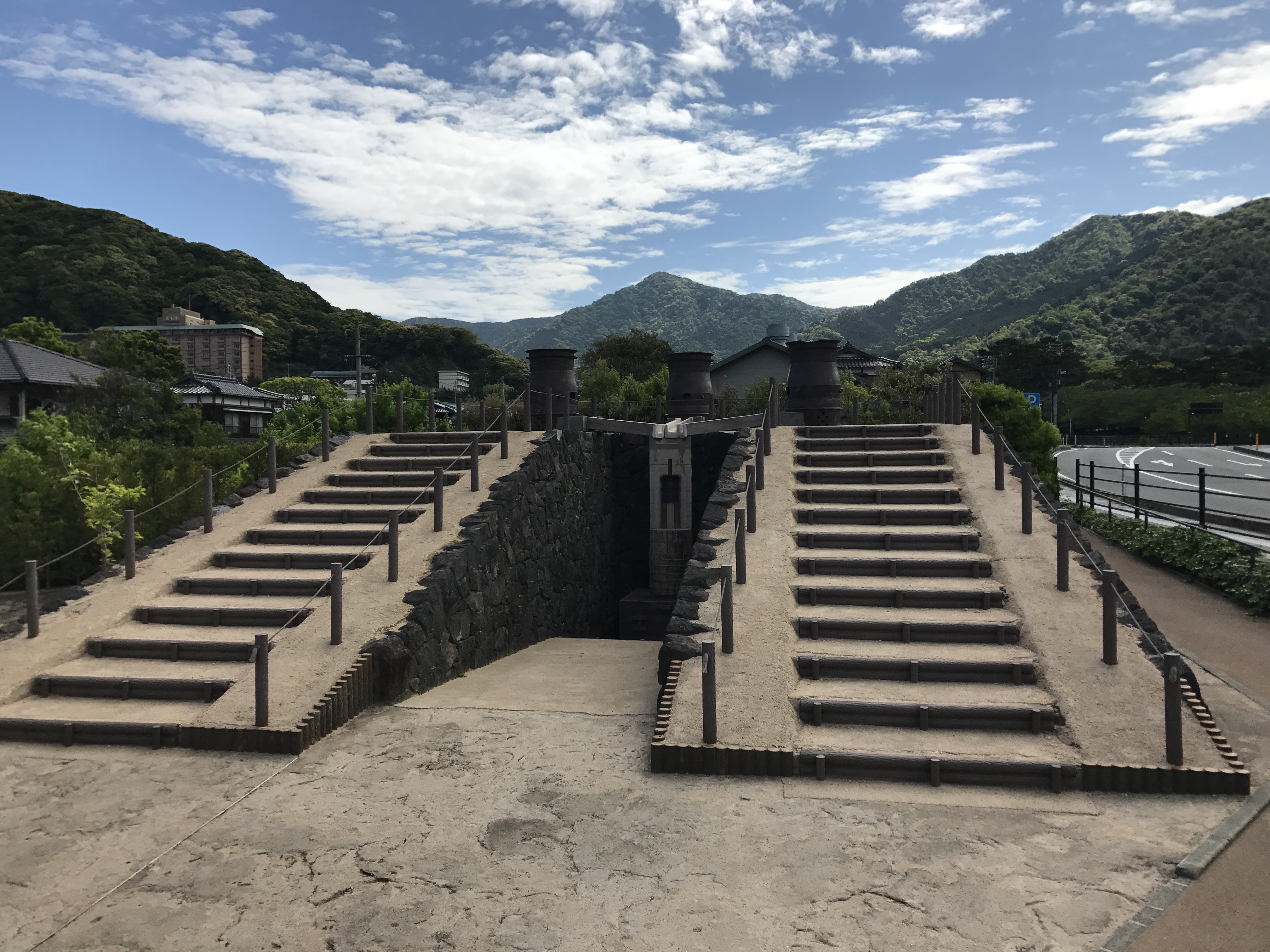 郡司鋳造所遺構広場